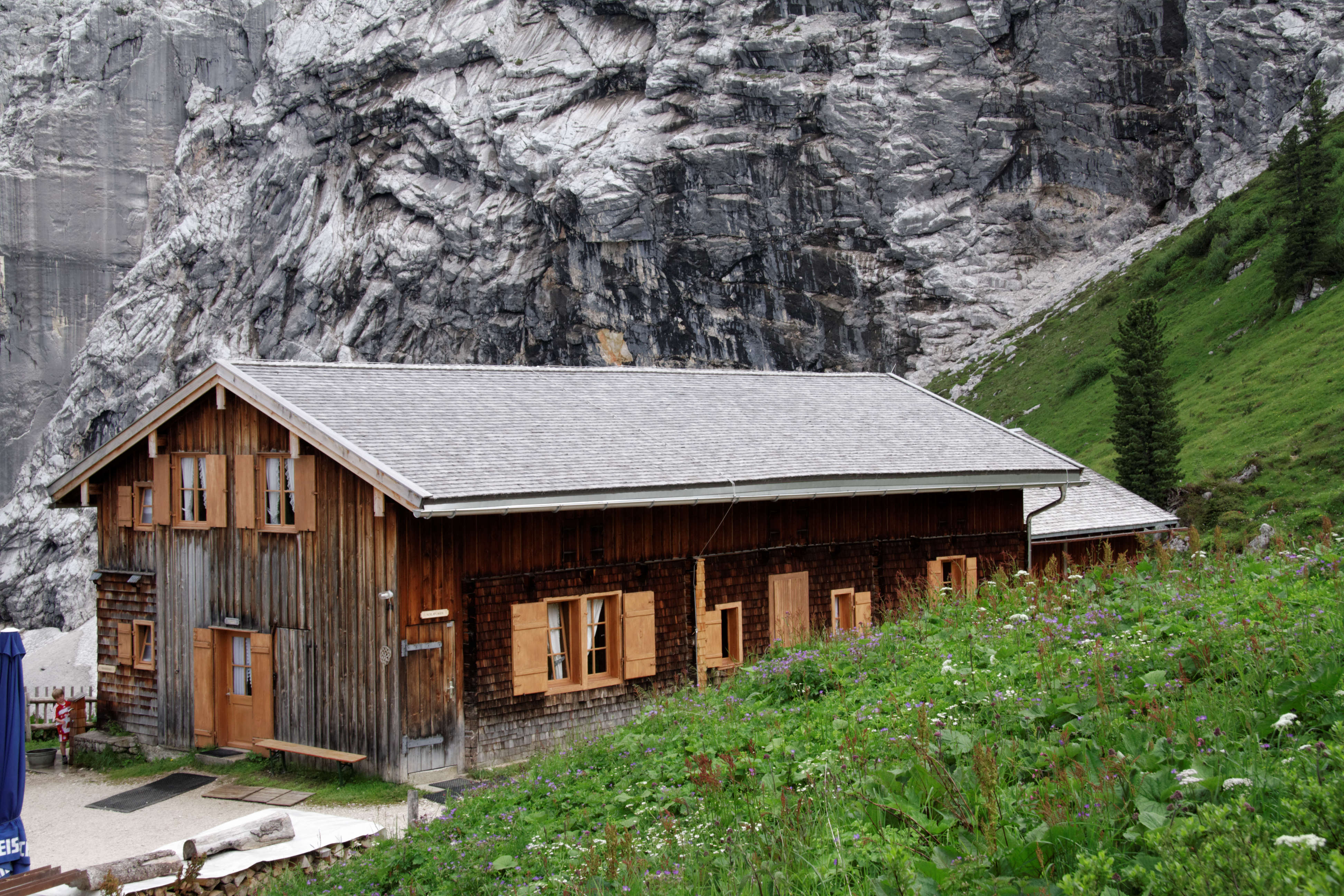 Garmisch-Partenkirchen, Berghütte am Schachenhaus